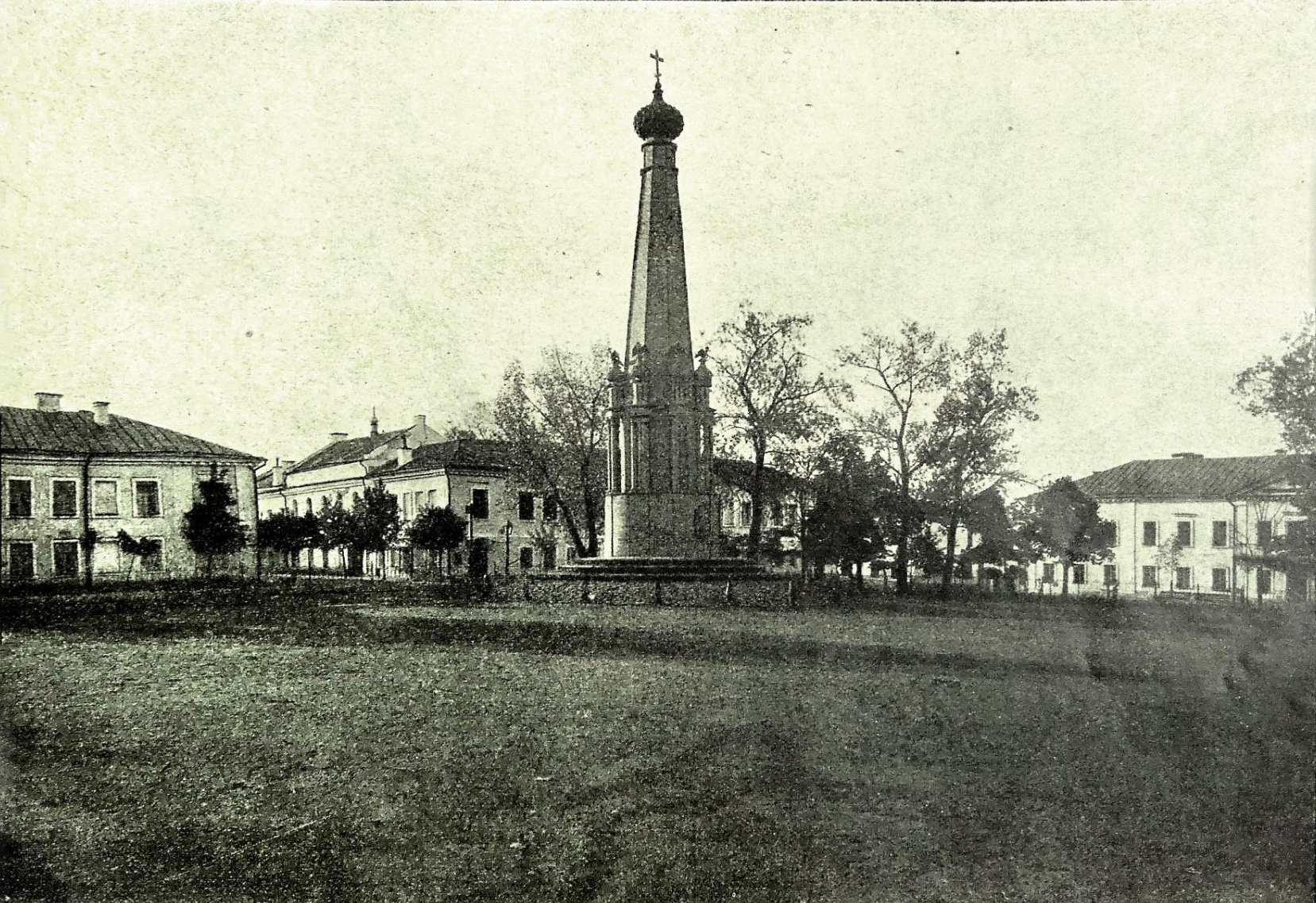 Беларуская (тарашкевіца): Полацак (Połacak), пляц Рынак (plac Rynak). Расейскі помнік вайне 1812 году